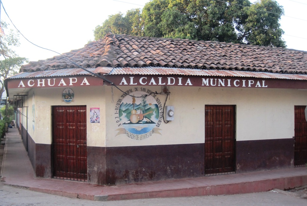 Alcaldia Municipal en Achuapa, NIcaragua